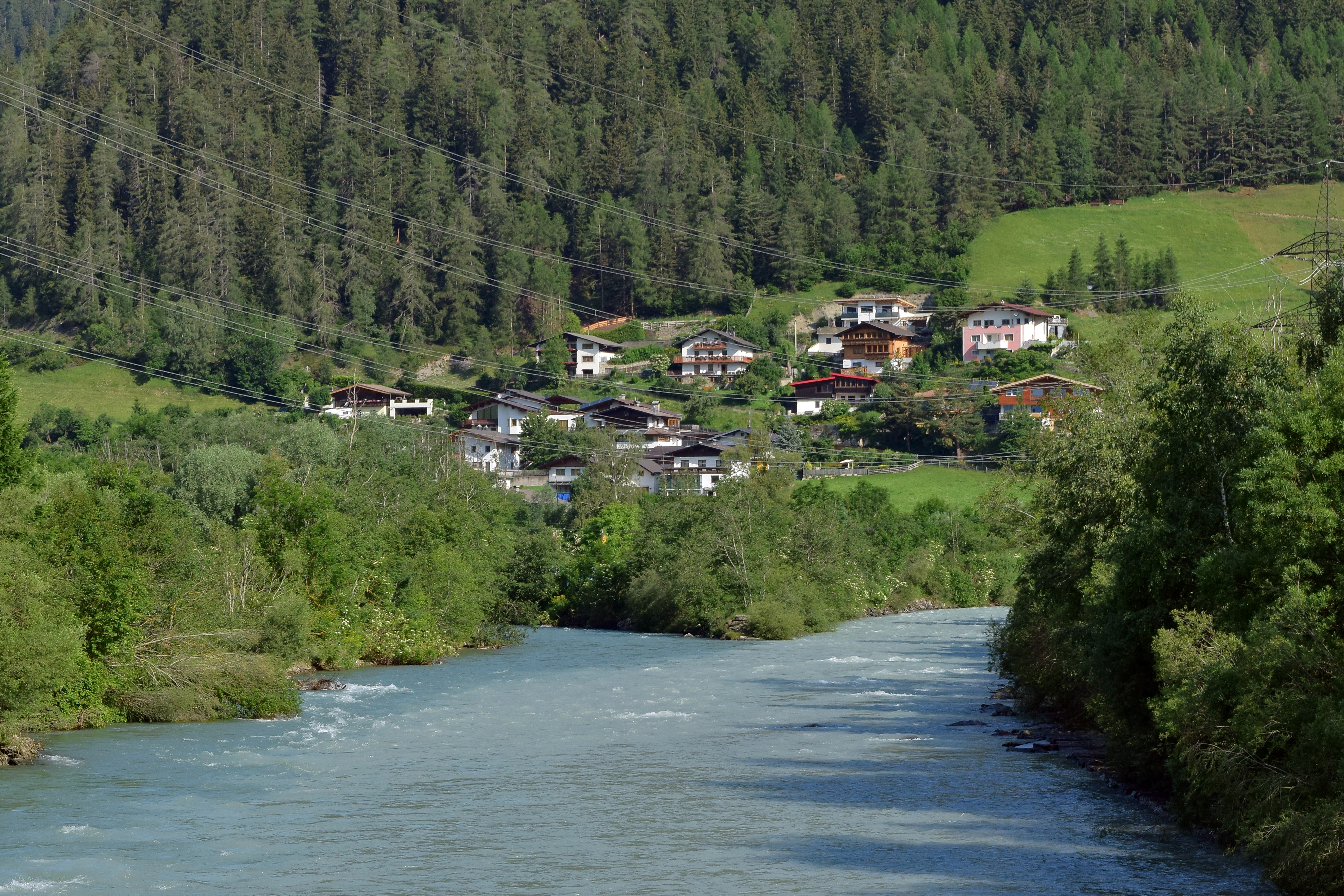 Mündung des Tauernbachs in die Isel, dahinter der Ortsteil Auerfeld der Fration Waier in der Gemeinde Matrei in Osttirol. Die Isel ist nach Natura2000 unter dem Code AT3314000 geschützt. 'Isel' (Q687448)